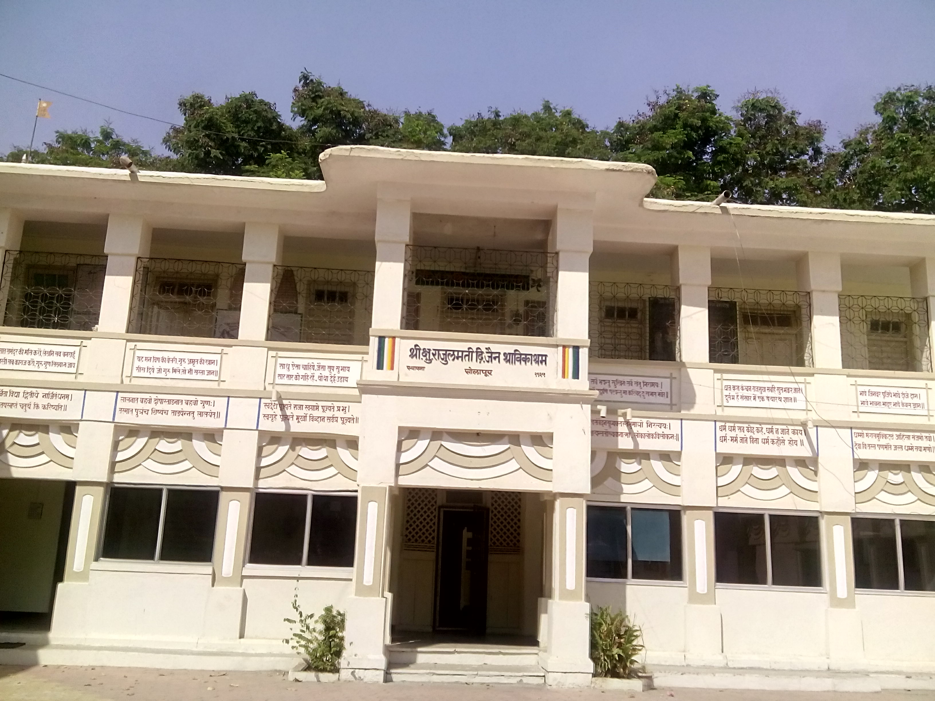 श्राविका आश्रम संस्था